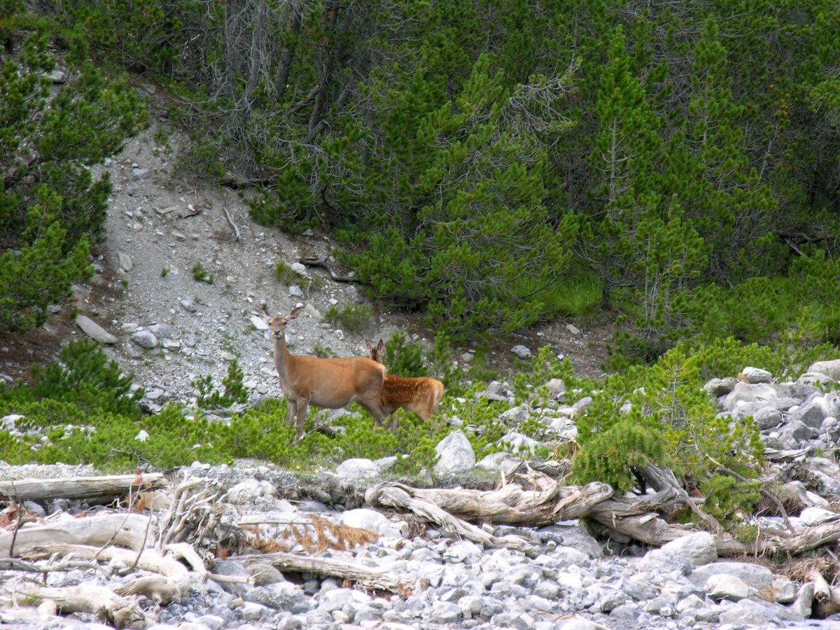 Switzerland, Graubünden, Swiss National Park